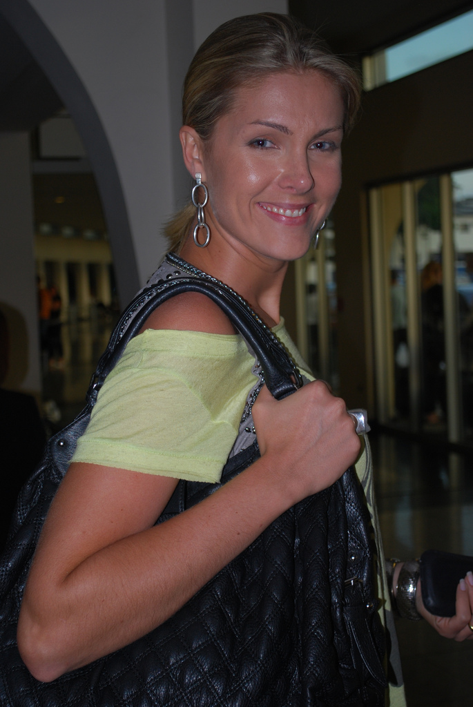 Ana Hickmann no Aeroporto de Congonhas, São Paulo.